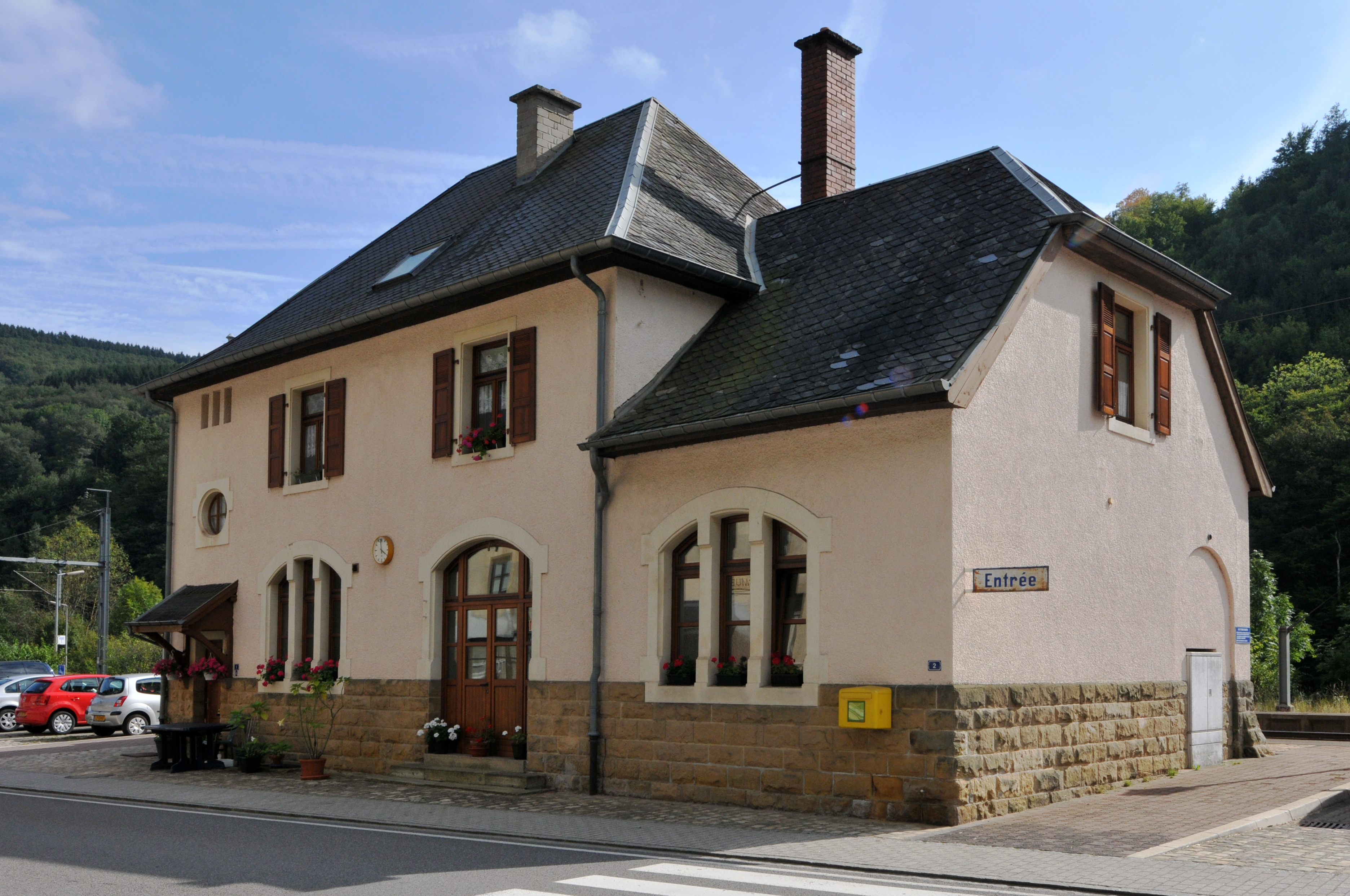 D'Gare op der Giewelsmillen.